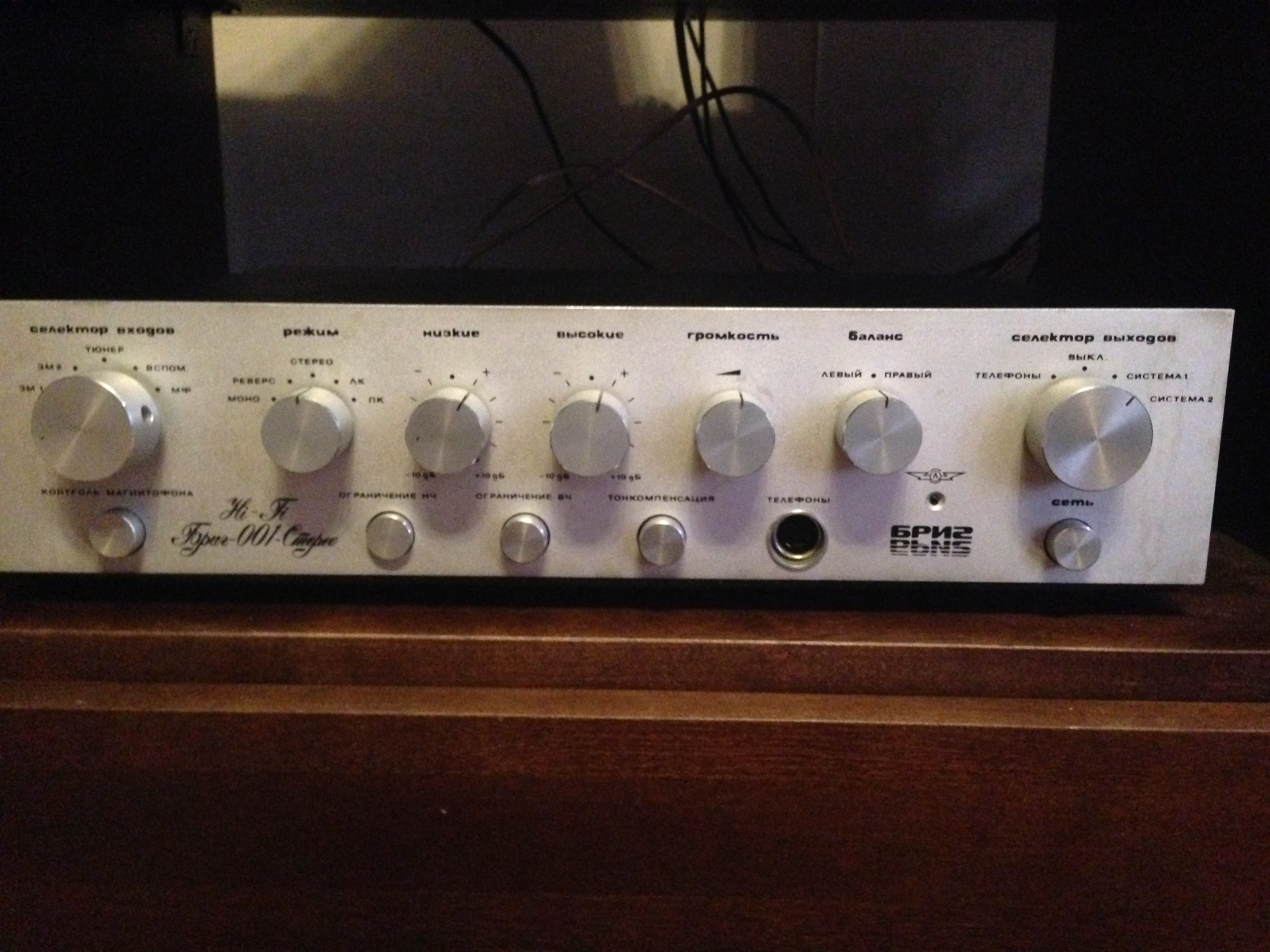 Вторая ревизия, с Хранения, без макинтоша (ауд-л Хорошавин А.А.).